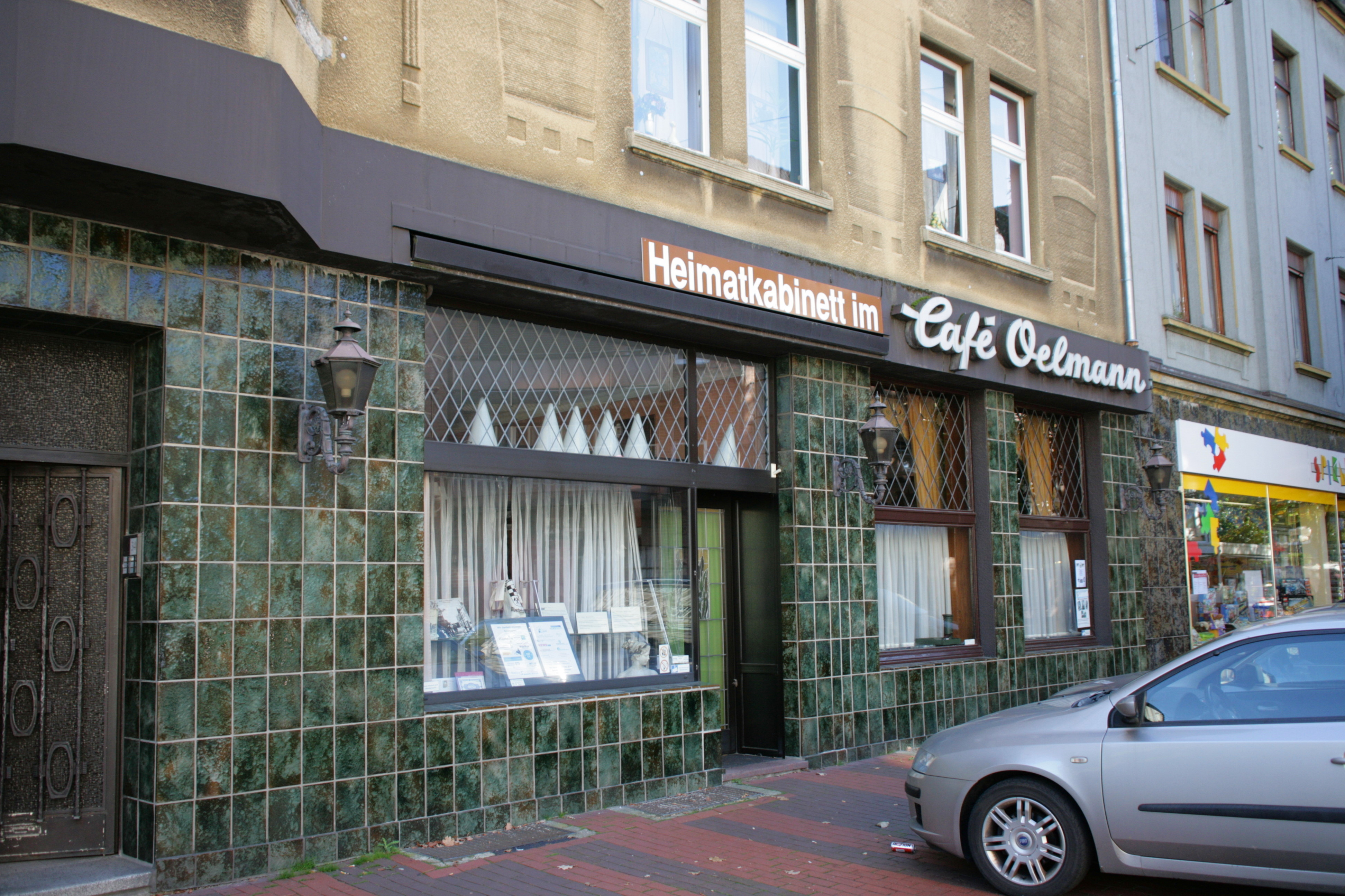 Heimatkabinett, Schlossstraße in Herten-Westerholt